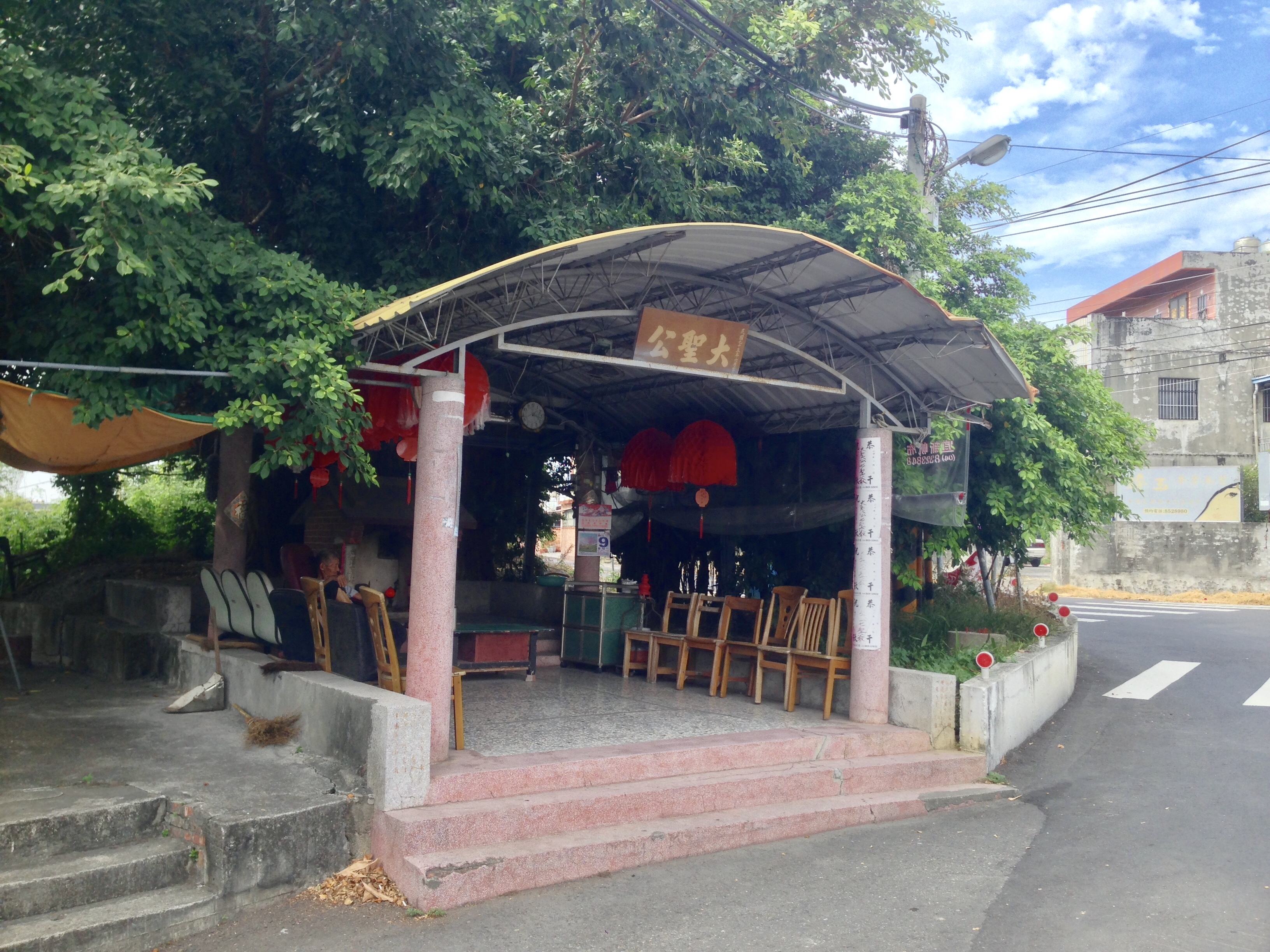 中文（台灣）: 大村鄉大聖公廟